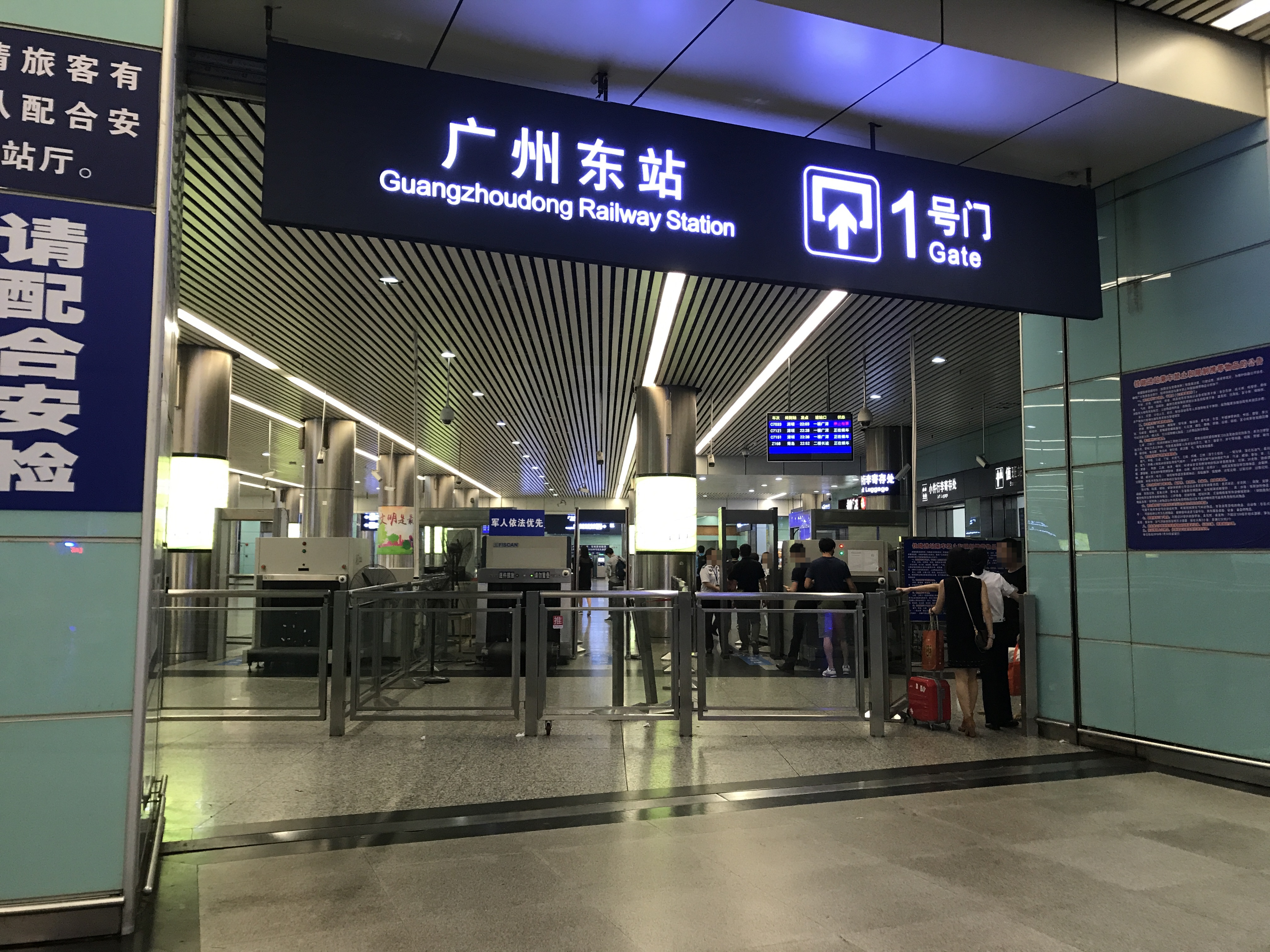 広州東駅構内